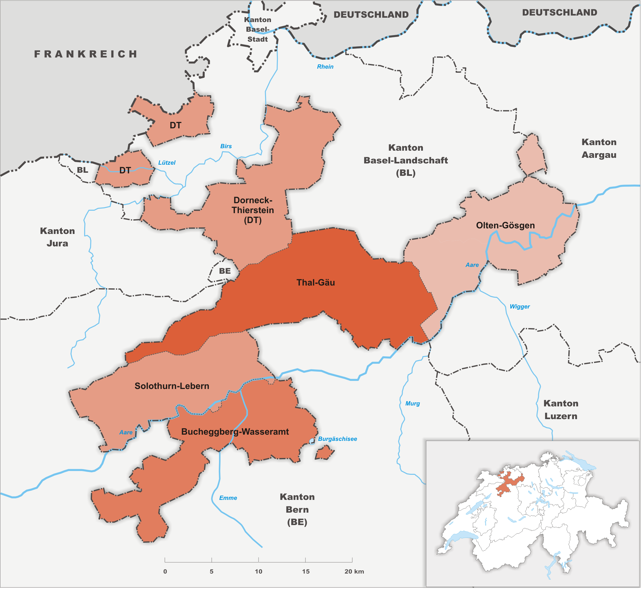 Amteien des Kanton Solothurn